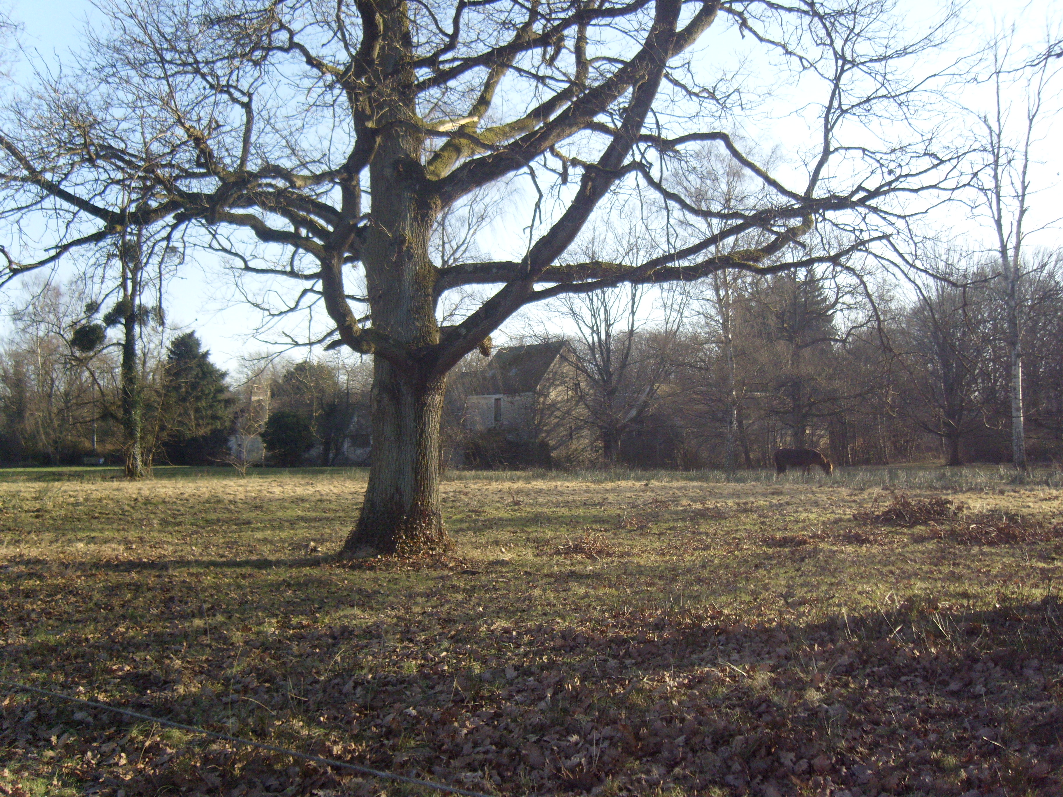 La ferme de Renouilleux à Fontenay-Trésigny